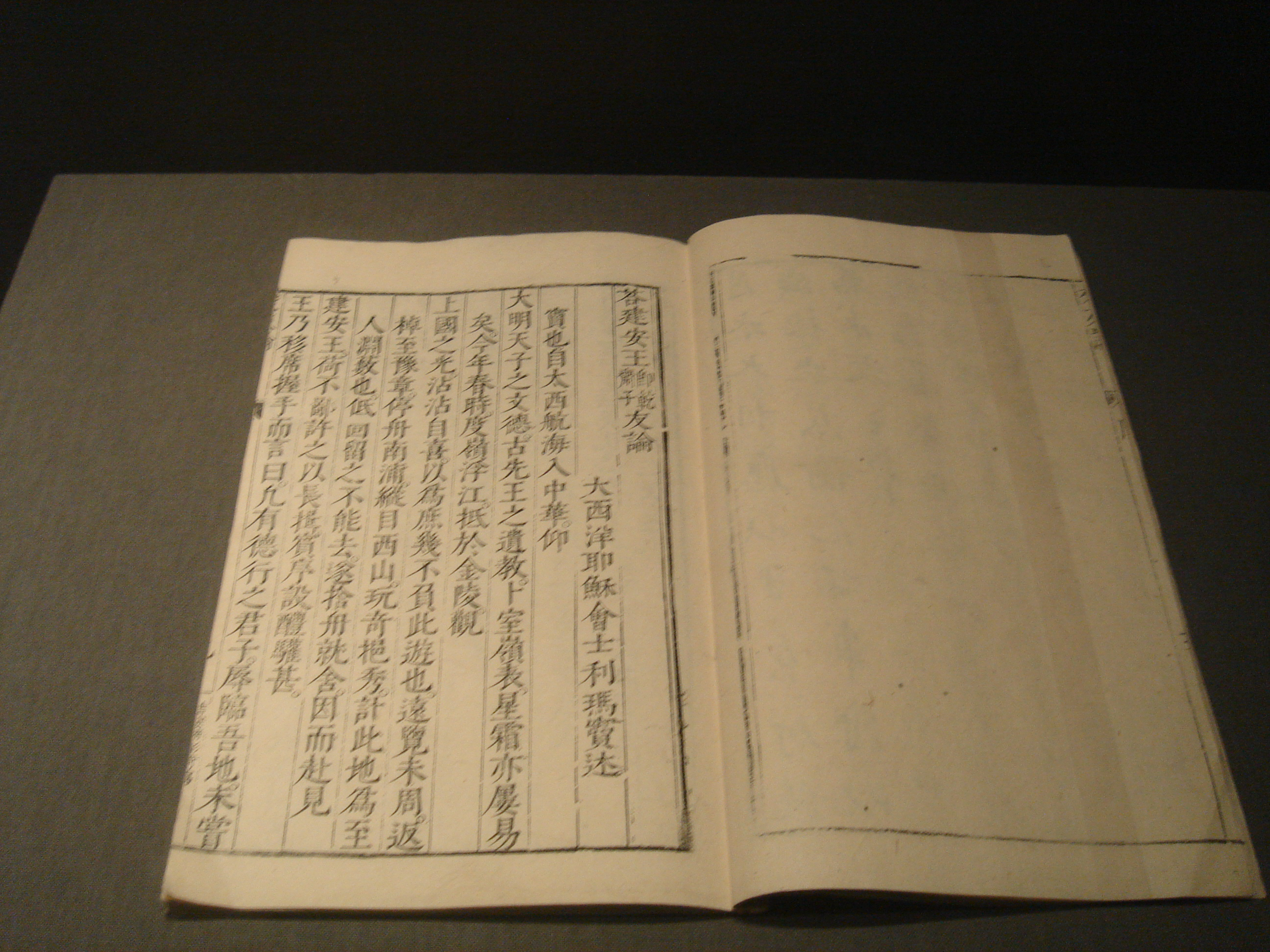 《交友论》，利玛窦1595年著，北京1601年印刷，藏于罗马中央国立图书馆，摄于北京首都博物馆